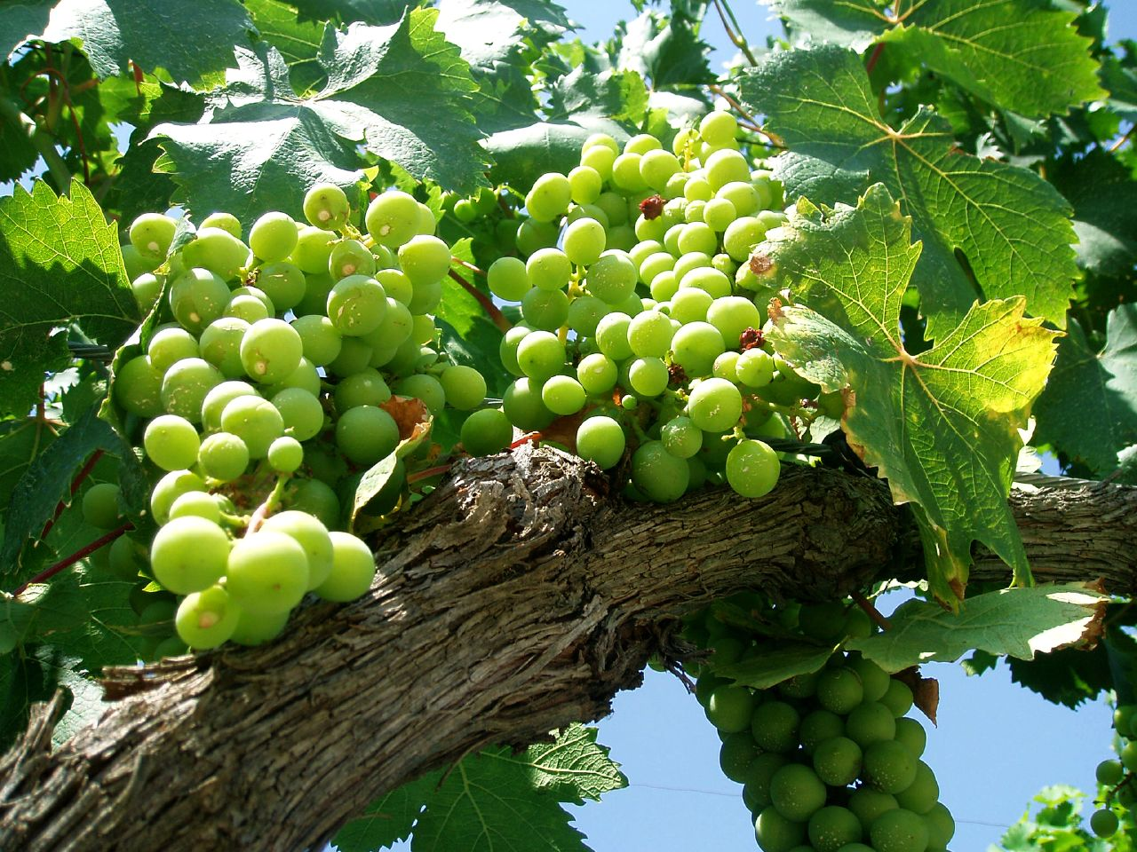 Santacara, Navarra